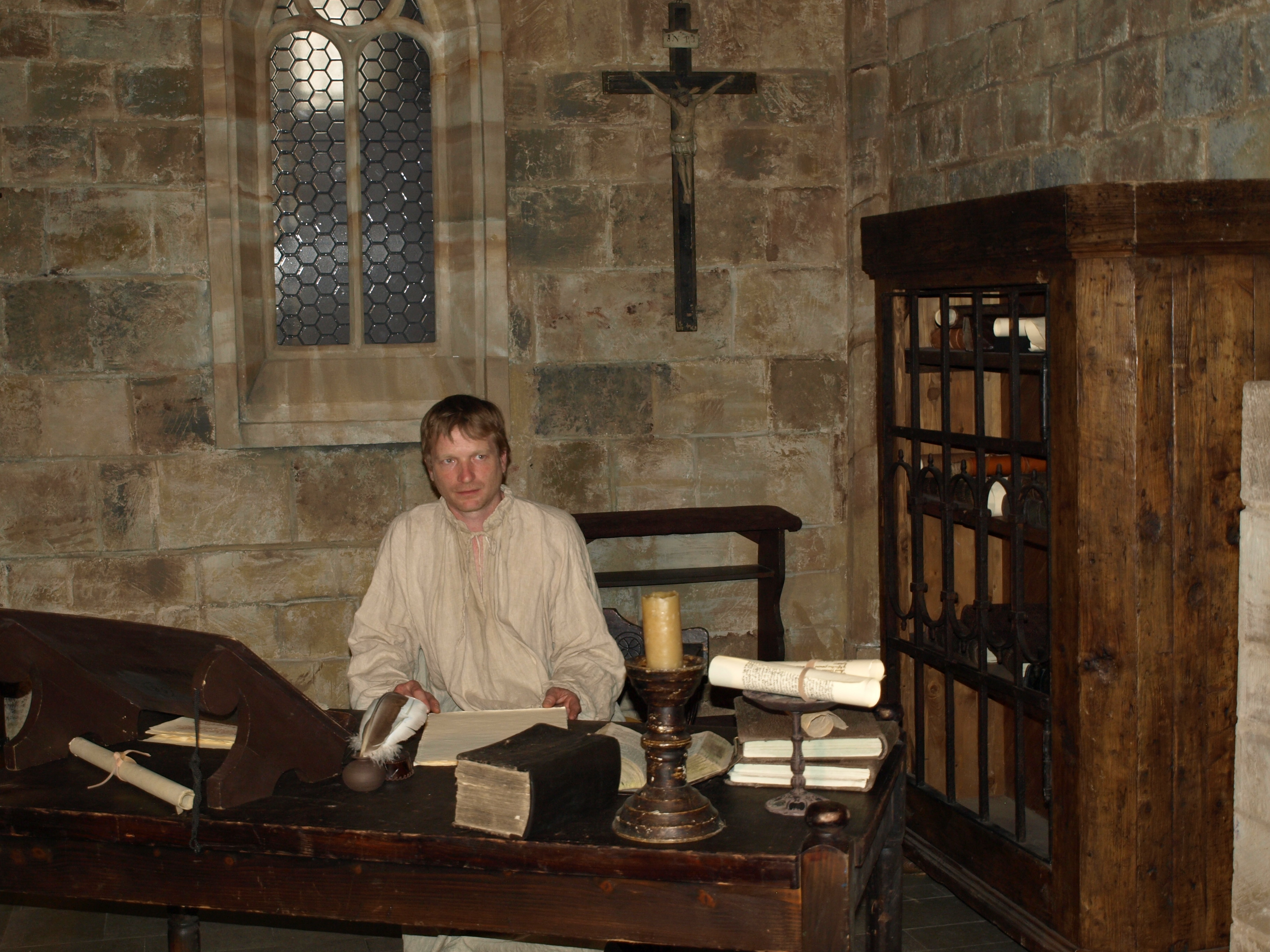 První klapka filmu Jan Hus - Autor: Karolína Černá a Emma Orphe pro & 10Mpix.cz